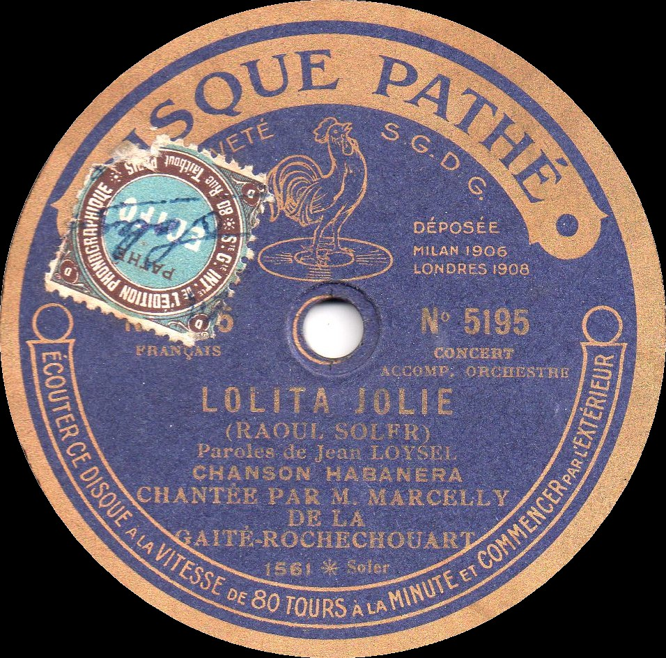 Disque phonographique, à gravure verticale (dit à saphir), fabriqué par Pathé. Milieu des années 20. Vitesse de rotation: 80 tours/min.